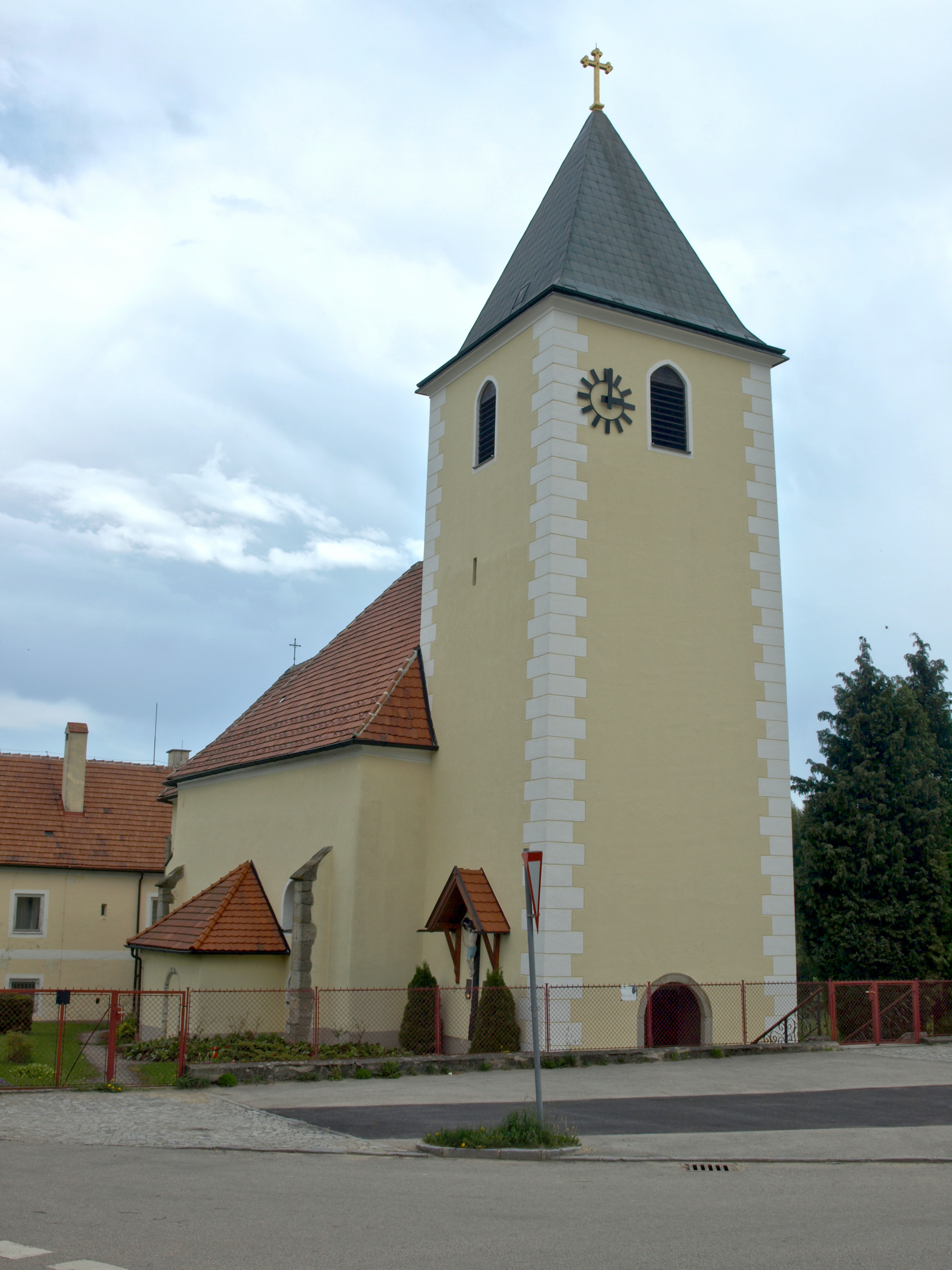 Kath. Pfarrkirche hl. Jakobus d. Ä., ehem. Friedhof